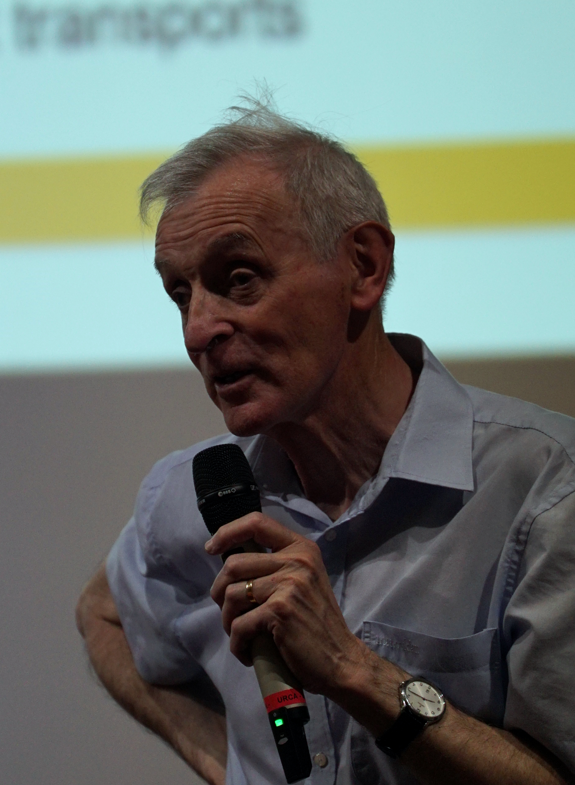 Jean Jouzel en conférence à Reims.